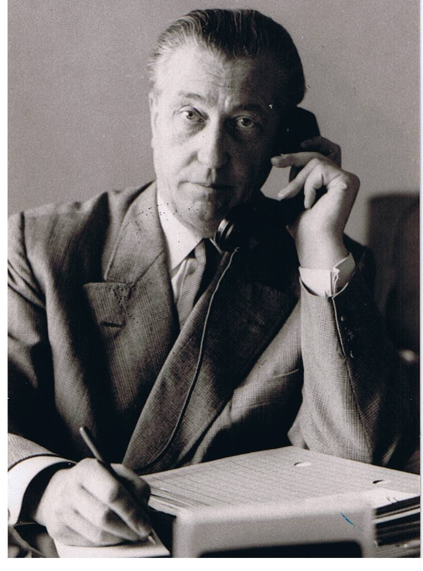 Dr. Wilhelm Nowack - Bild: FDP Rheinland-Pfalz